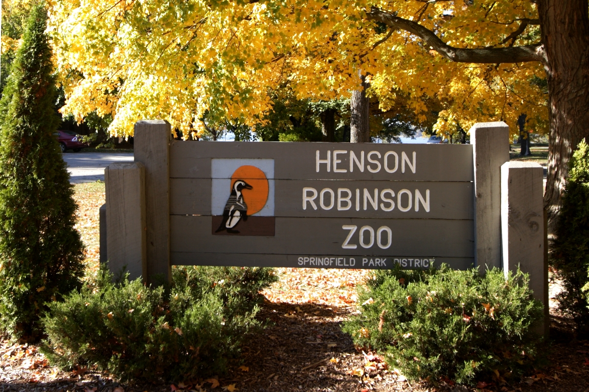 Henson Robinson Zoo entrance, Springfield, Illinois